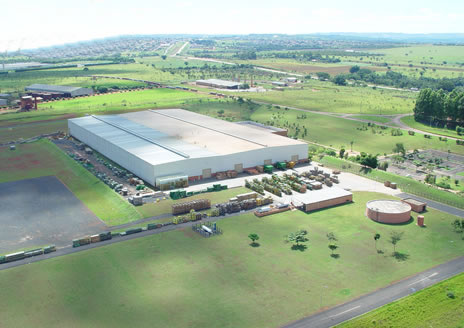 Uma foto da Montadora da Mitsubishi em Catalão, Goiás